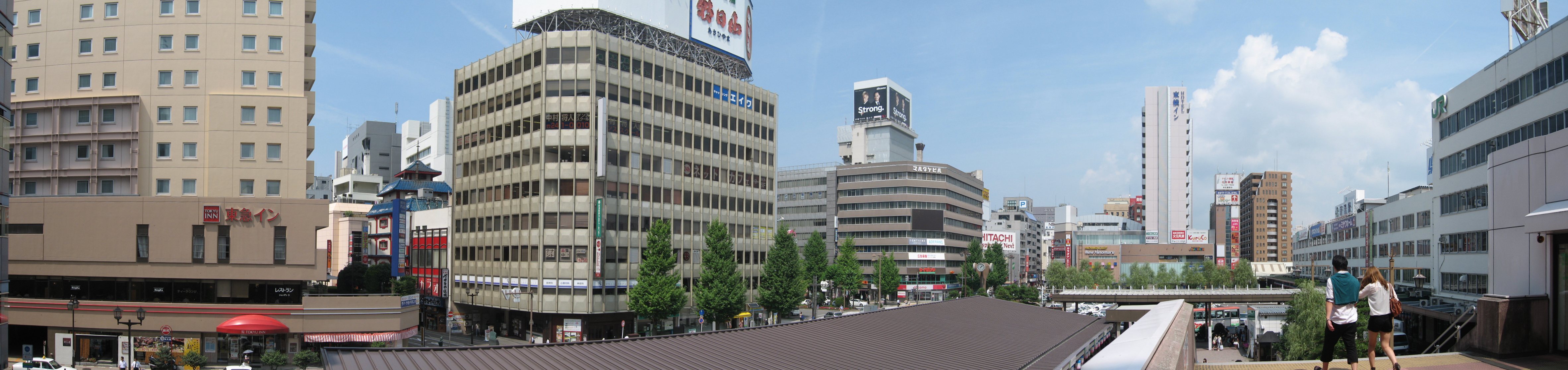 新潟市中央区。新潟駅前地区のパノラマ画像。